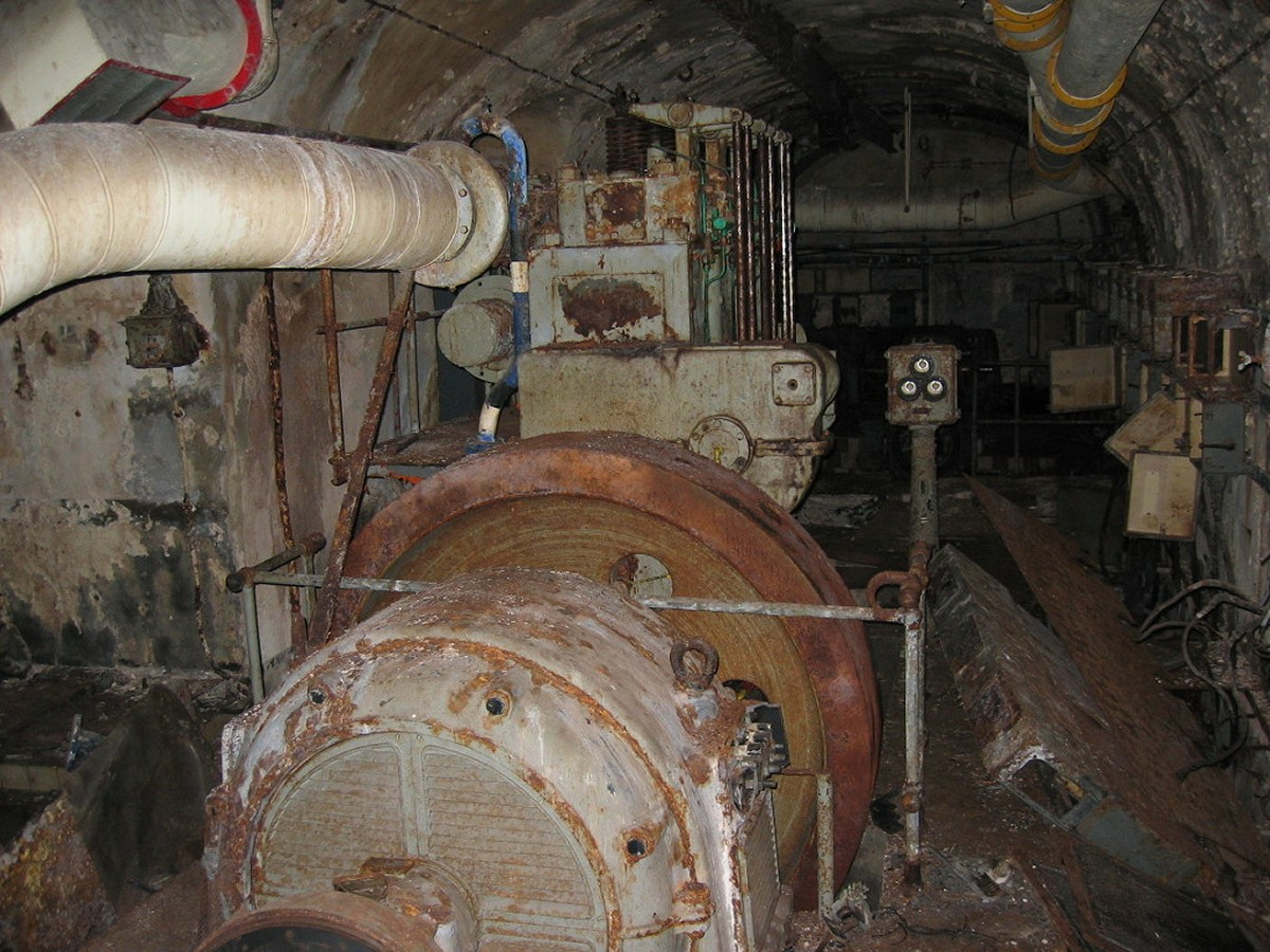 Ligne Maginot - Gros Ouvrage de Soetrich - Usine